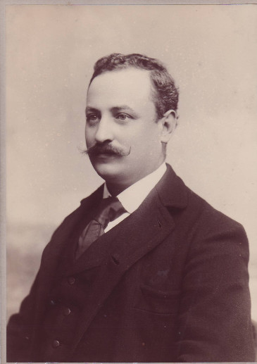 Federico Sartori, Pittore - Milano 1865 - Milano 1938